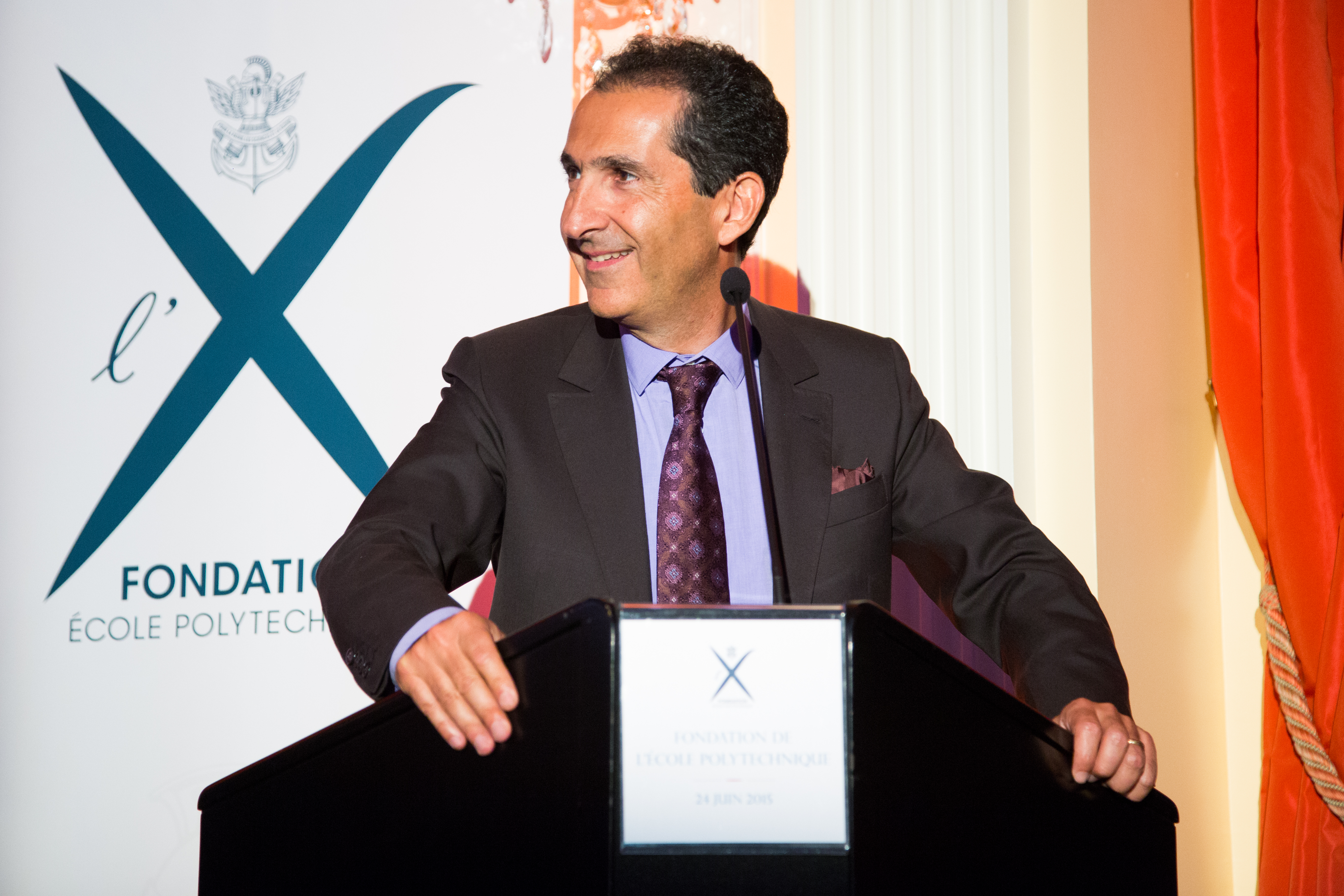 Discours de Patrick Drahi (X1983) , plus grand mécène privé de l'École polytechnique.